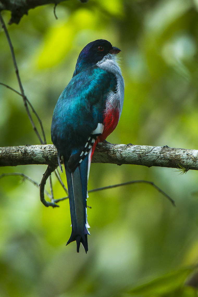 Cuban Trogon - Cuba_S4E9342